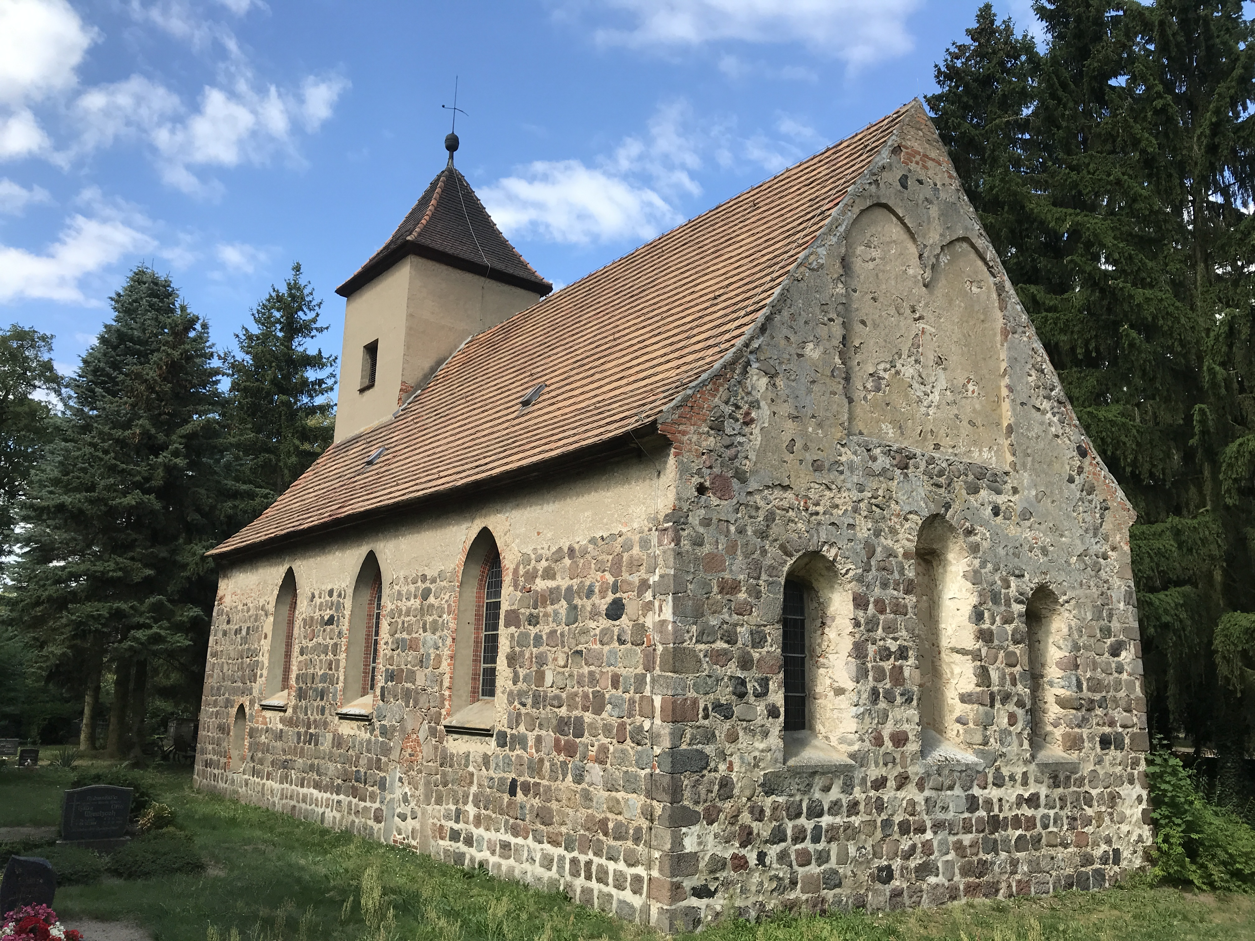 Die Dorfkirche Schönfelde der Gemeinde Steinhöfel ist eine Feldsteinkirche aus dem 13. Jahrhundert. In ihrem Innern steht unter anderem ein Kanzelaltar aus dem 18. Jahrhundert.